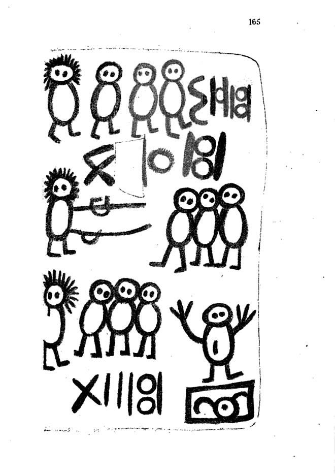 Livre des sauvages. Page 165.